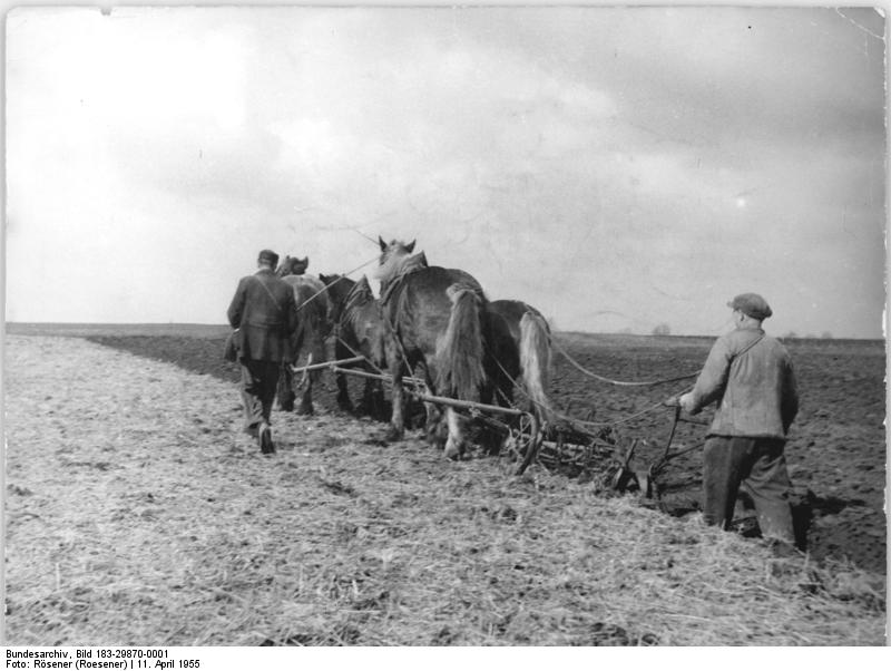 Salbke, Vorbereitung der Aussaat, Pflügen Zentralbild Rösener 11.4.1955 Auch Ostern auf dem Feld! Durch die schlechten Witterungsverhältnisse sind Zeitverluste in der Frühjahrsbestellung entstanden. An den Osterfeiertagen bearbeiten daher die werktätigen Bauern ihre Felder, um die Zeitverluste aufzuholen. UBz: Der werktätige Einzelbauer Mankowski aus Salbke (Bez. Magdeburg) pflügt mit 4 Pferden auf dem Feld, das wegen der Bodenfeuchtigkeit von Traktoren noch nicht bearbeitet werden konnte.